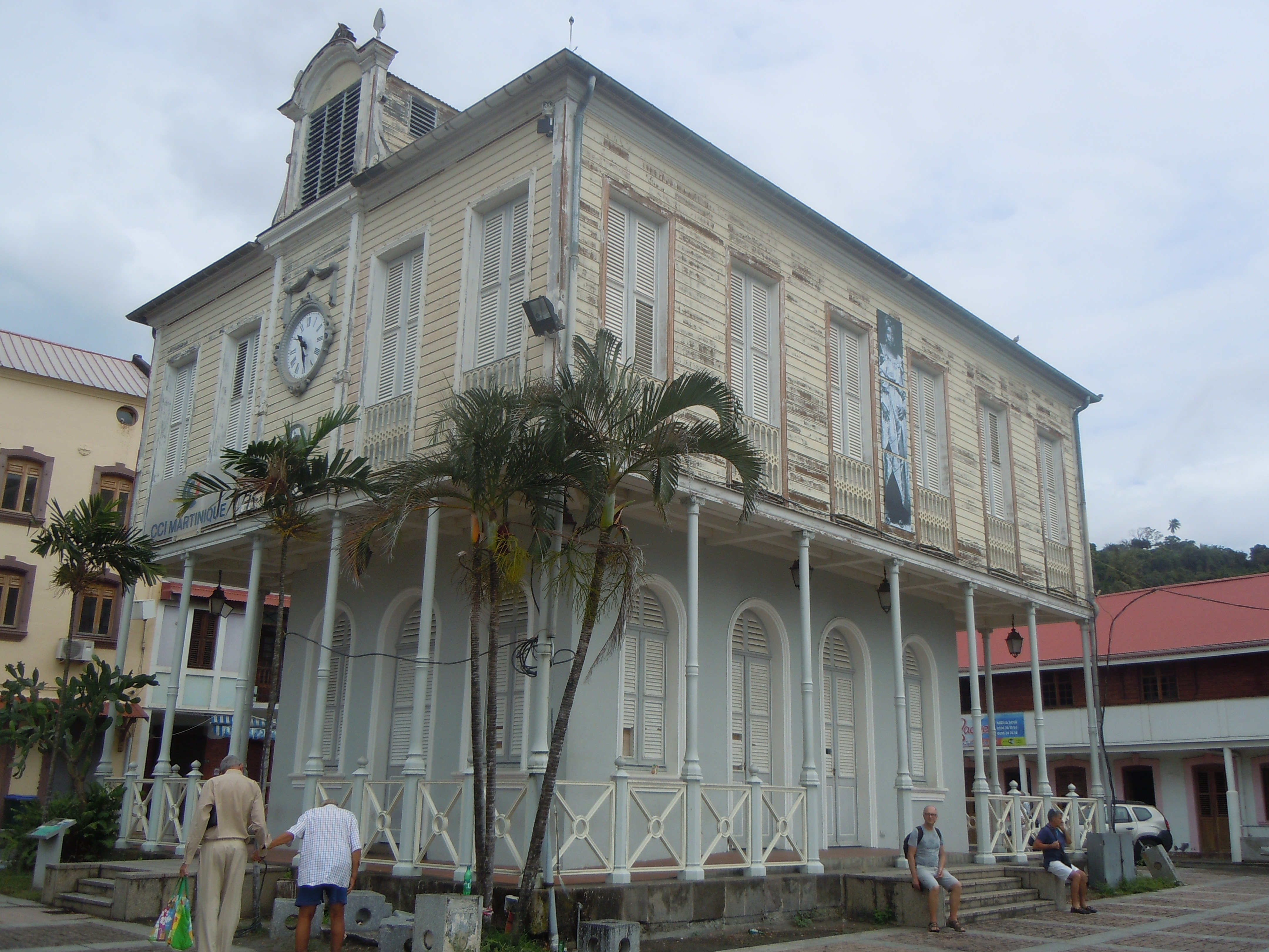 Chambre de Commerce et d'Industrie - Place Bertin, Saint-Pierre, Martinique